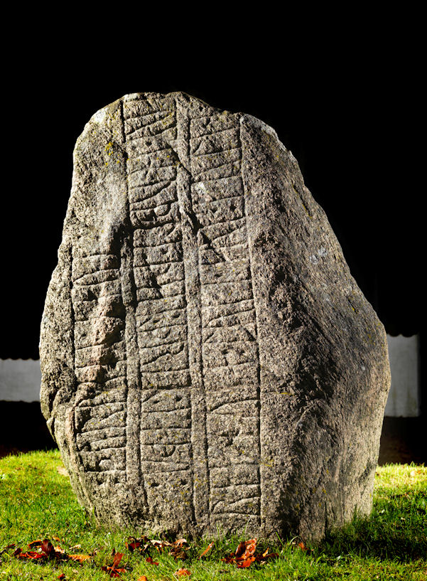 Foto af Roberto Fortuna